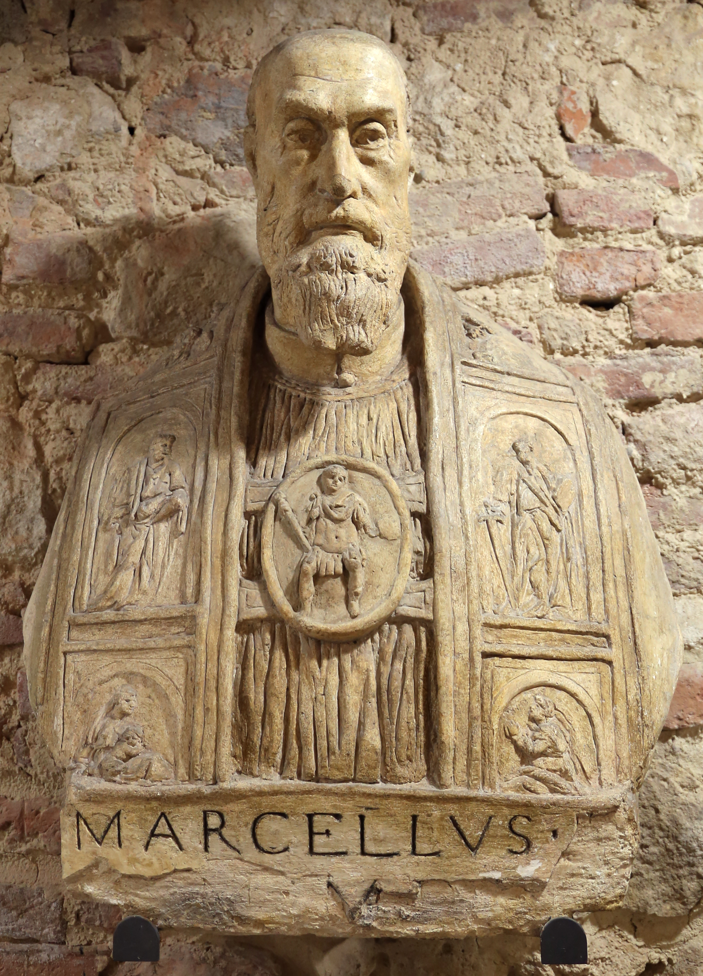 Museo civico di Montepulciano This is a photo of a monument which is part of cultural heritage of Italy.